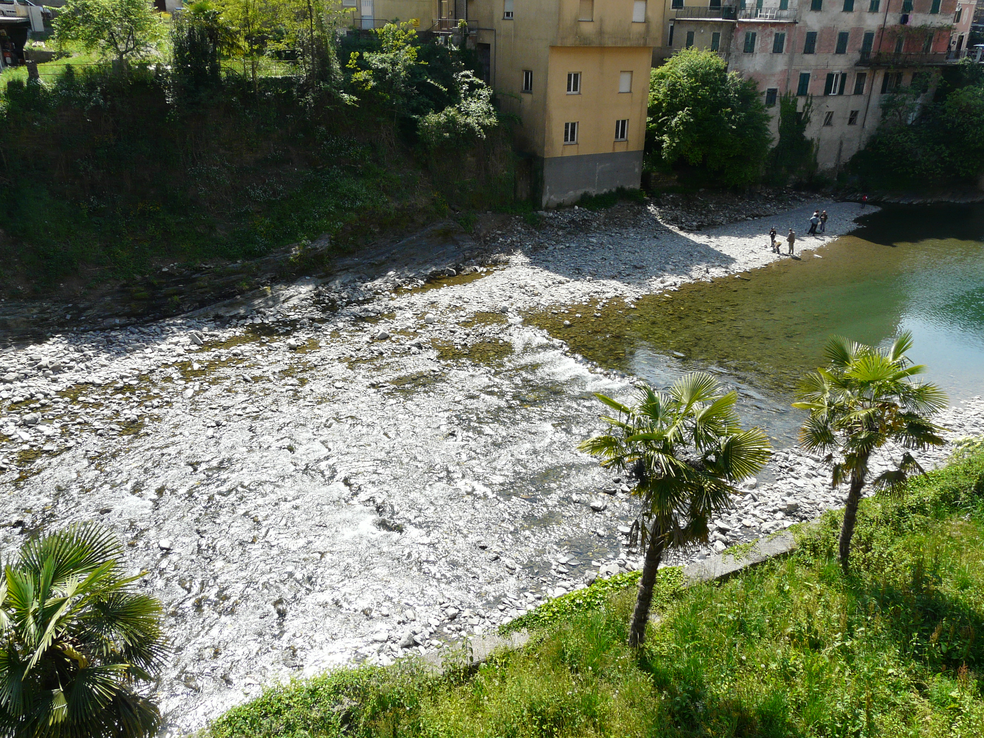 Torrente Lavagna presso Cicagna, Liguria, Italia